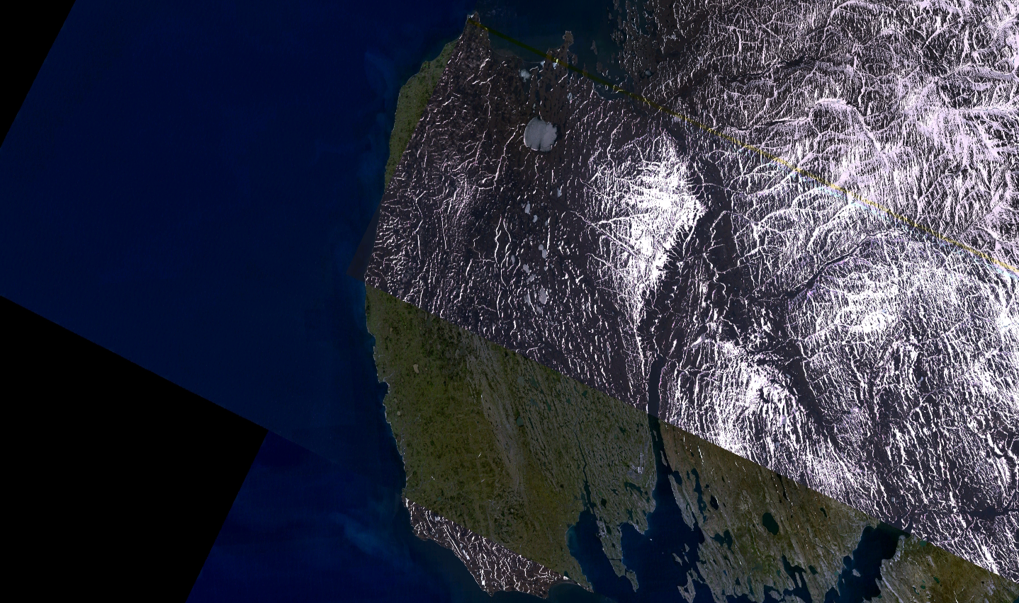 Гусиная Земля - полуостров на острове Южном архипелага Новая Земля Архангельской области России.